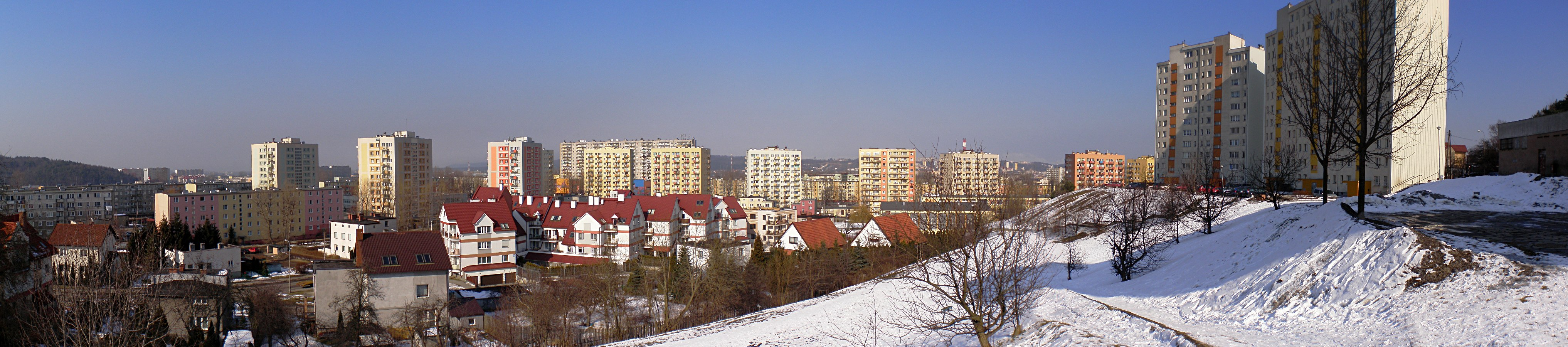 Chylonia